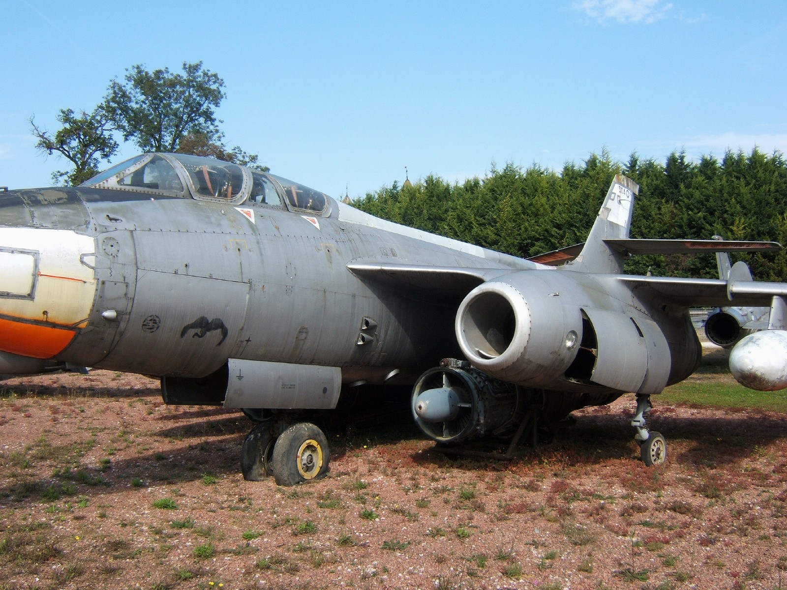 Vautour II N conservé au musée du château de Savigny-les-Beaunes. Cet appareil a été utilisé par le Centre d'Essais en Vol et modifié pour tester le radar du futur Mirage F1 (suppression des canons à l'avant, nouveau nez semblable à celui du F1).